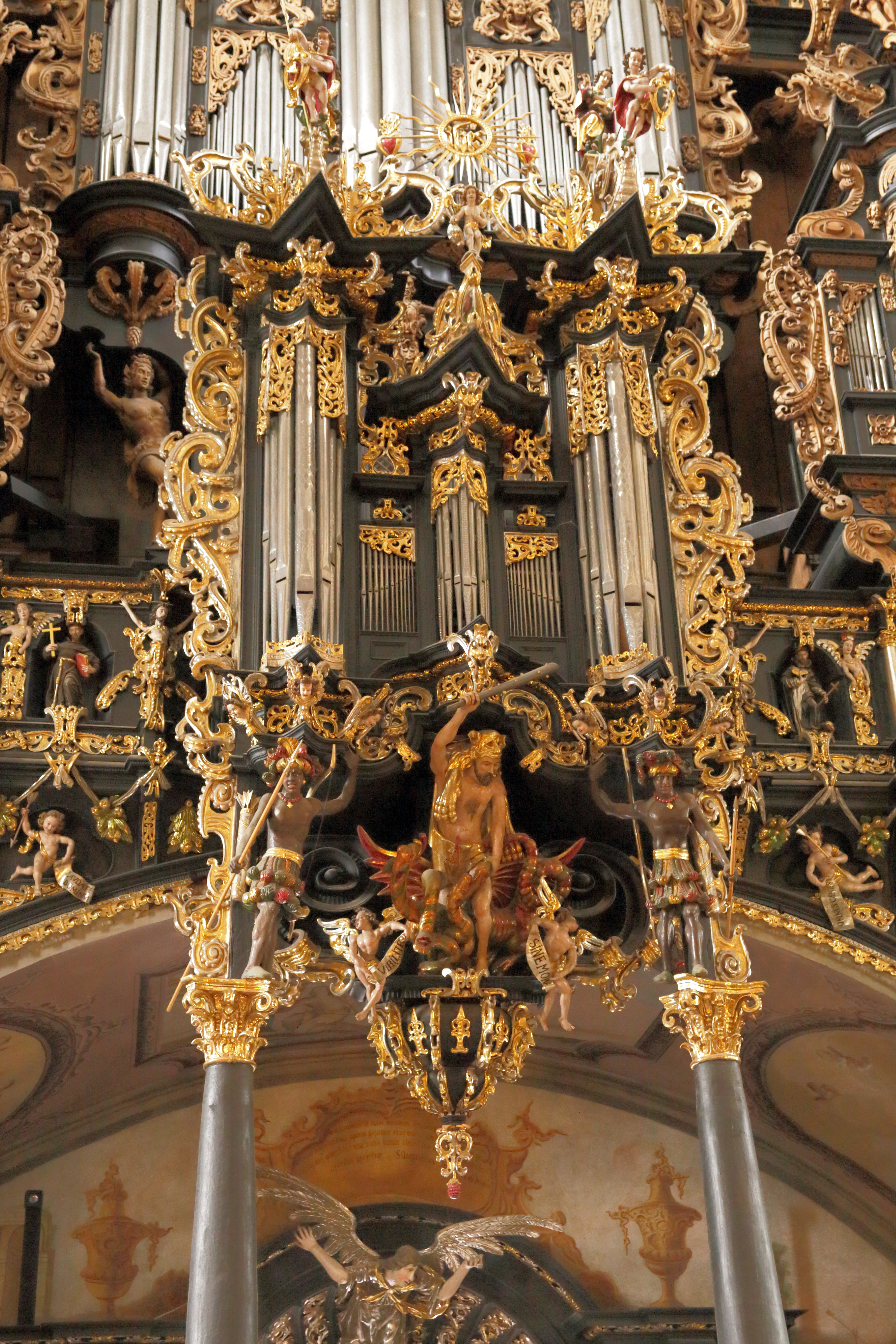 Organy w Leżajsku - detal (Rückpositiv).